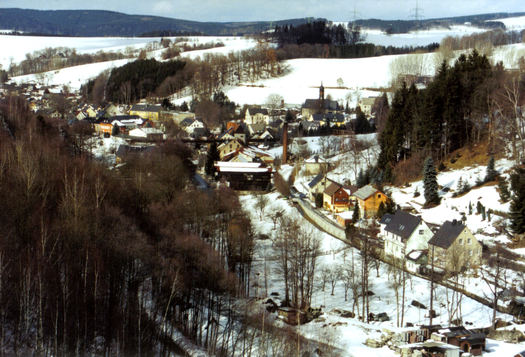 Blick von der Staumauer auf den Ortskern